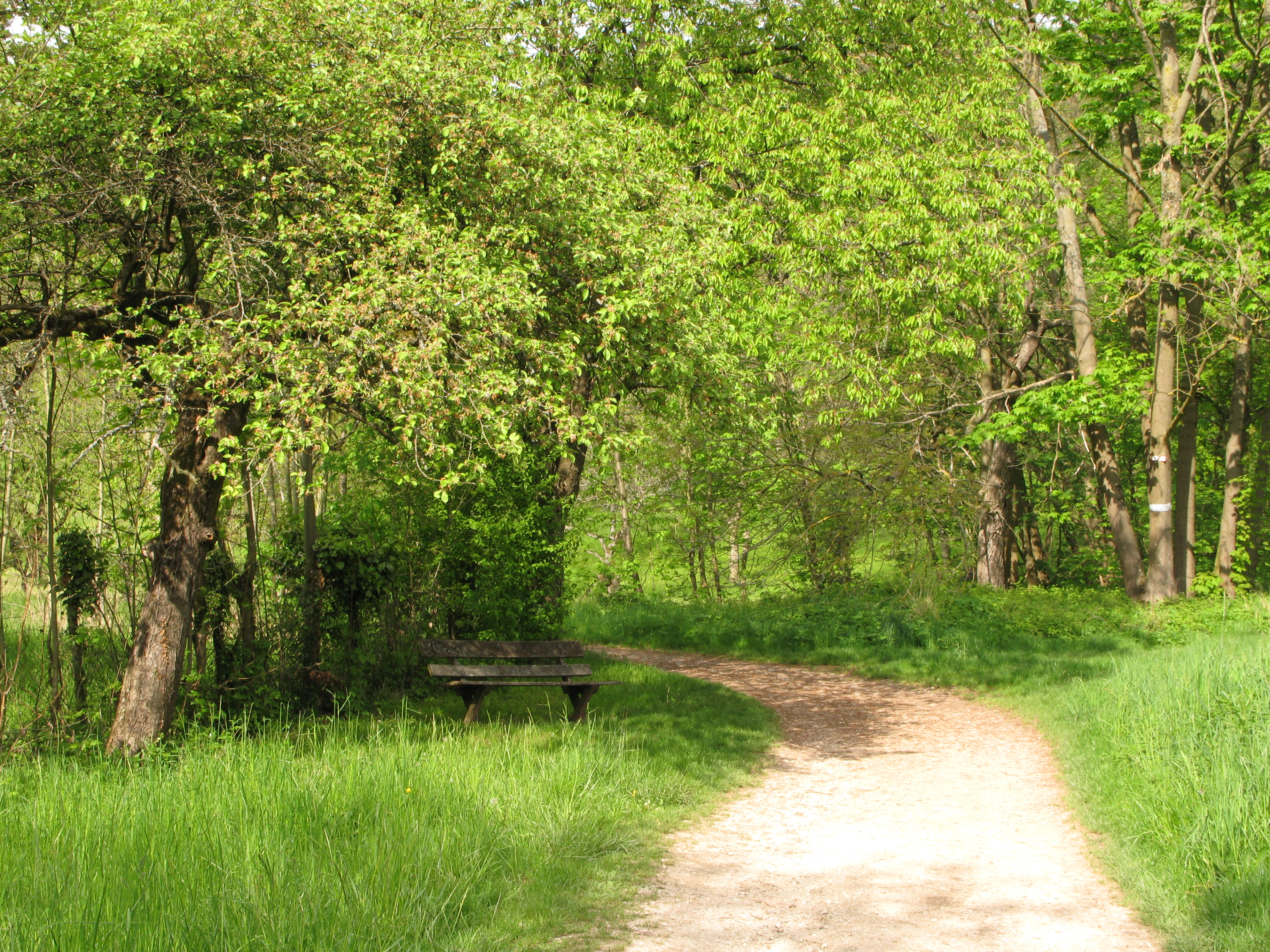 Wegverlauf am Tüllinger Berg am Fernwanderweg Markgräfler Wiiwegli im Markgräflerland.